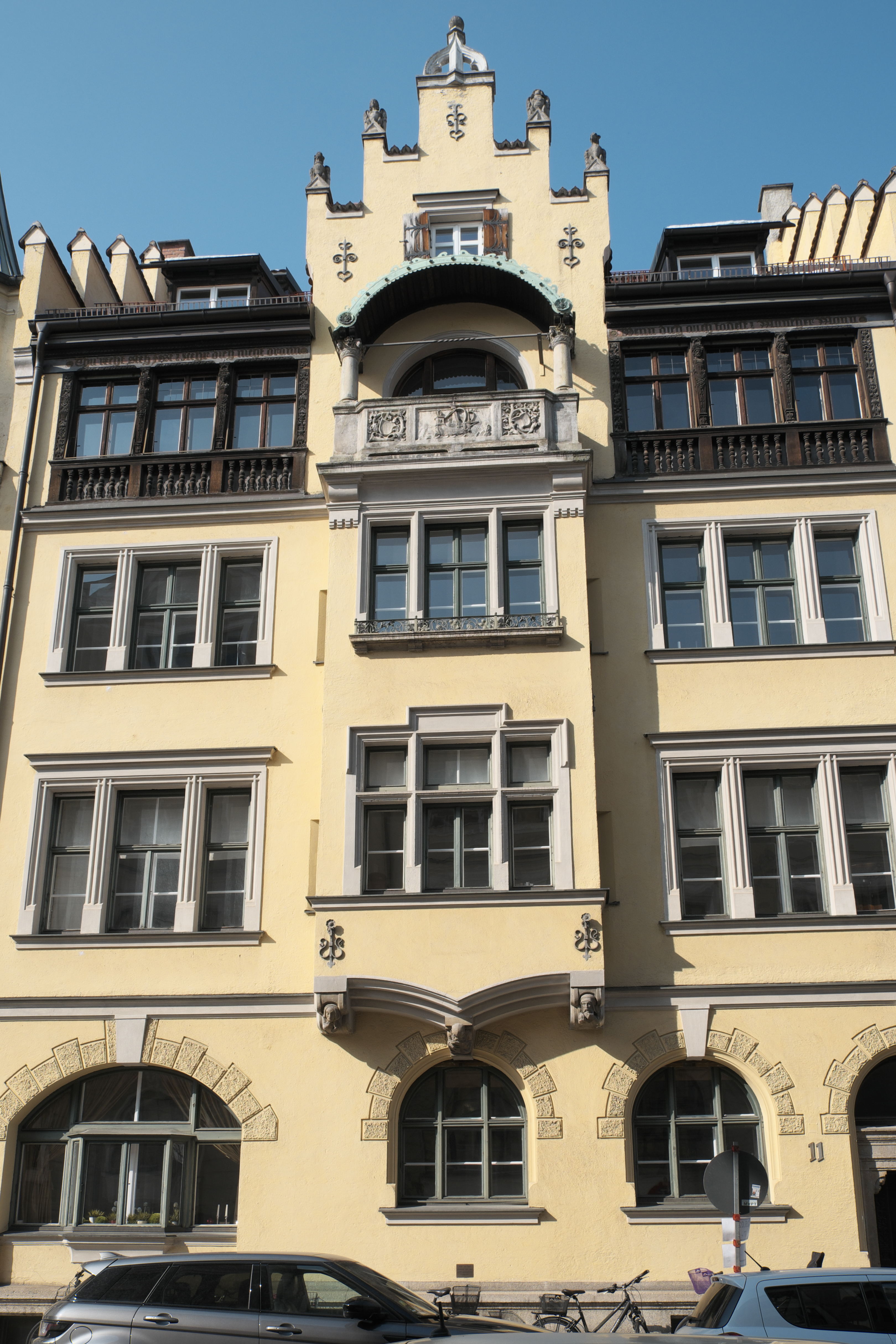 Wohnhaus in der Richard-Wagner-Straße 11 im Stadtbezirk Maxvorstad in München (Bayern/Deutschland)